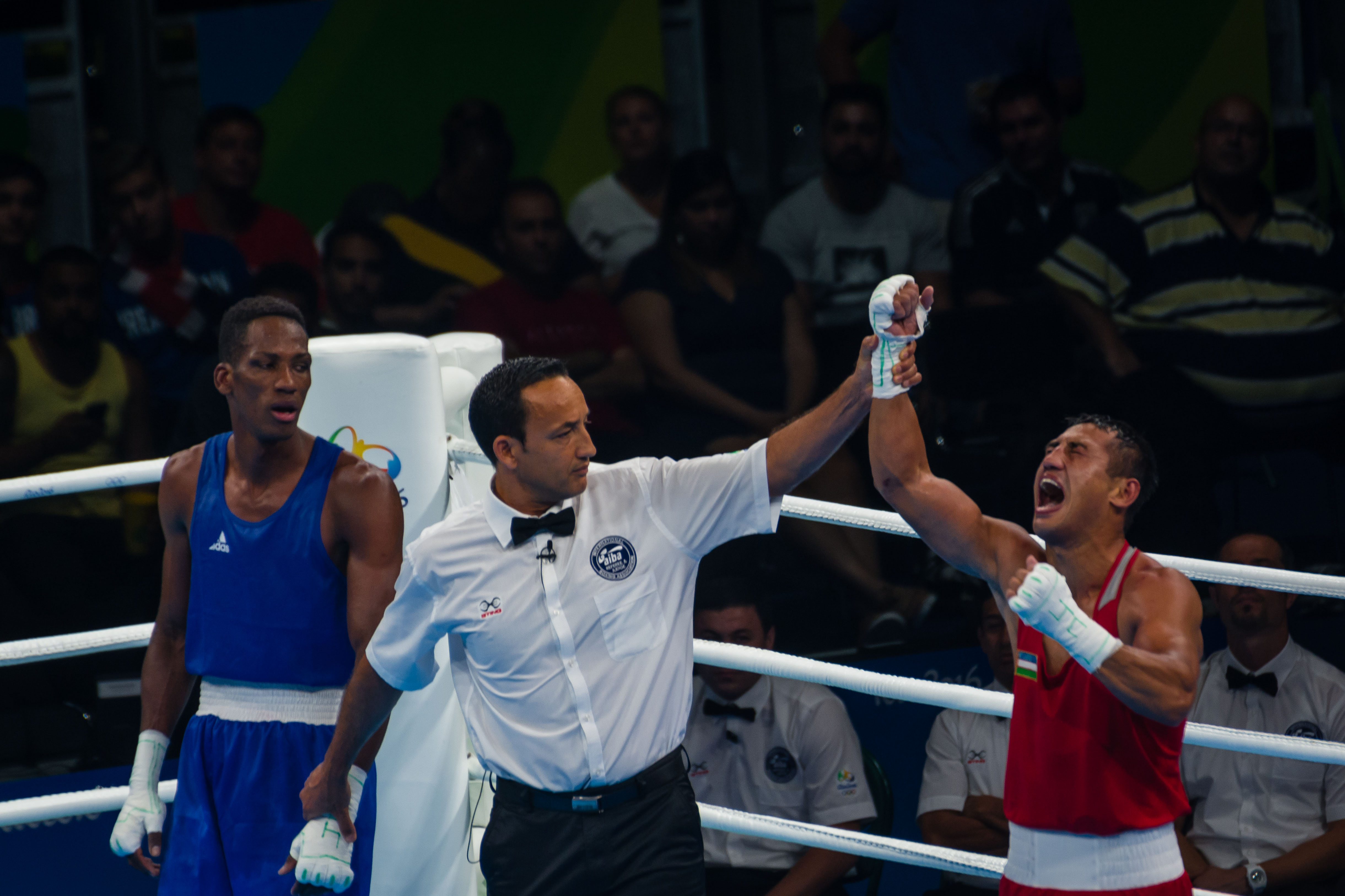 Artem Harutyunyan, do Uzbequistão, é anunciado medalhista de ouro na final contra Lorenzo Sotomayor Collazo (Azerbaijão), Categoria boxe peso meio-médio ligeiro 64kg masculino. Luta disputada em 21/08/2016, no Pavilhão 6 do Riocentro.